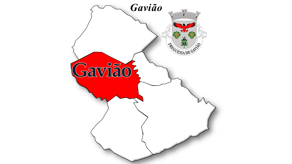 Evolução da População